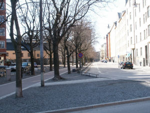 Katarina bangata, Stockholm, Sweden. Vy från Greta Garbos Torg mot Skatteskrapan.